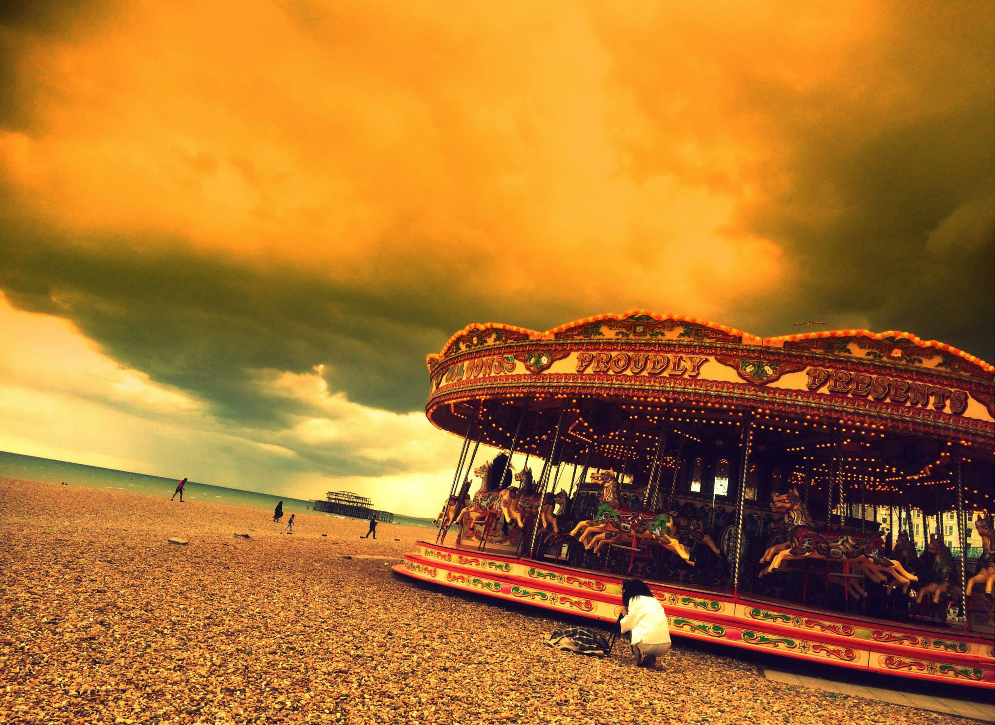 Kdysi rybářské město se dnes soustředí především na turistický ruch a služby s tím spjaté